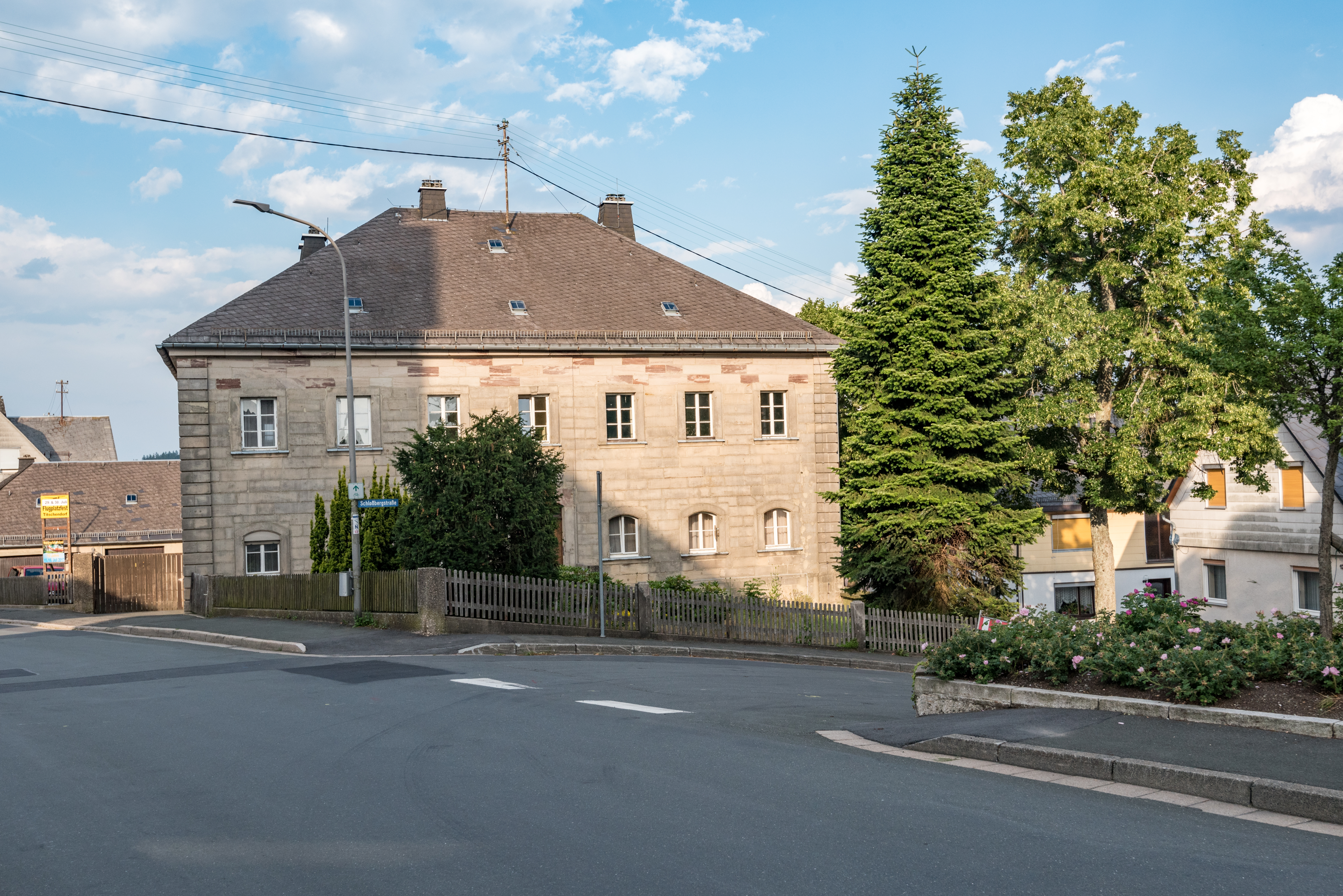 Nordhalben, Kronacher Straße 7